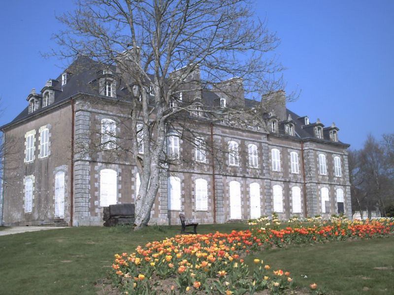 Château de Manéhouarn à Plouay (56)